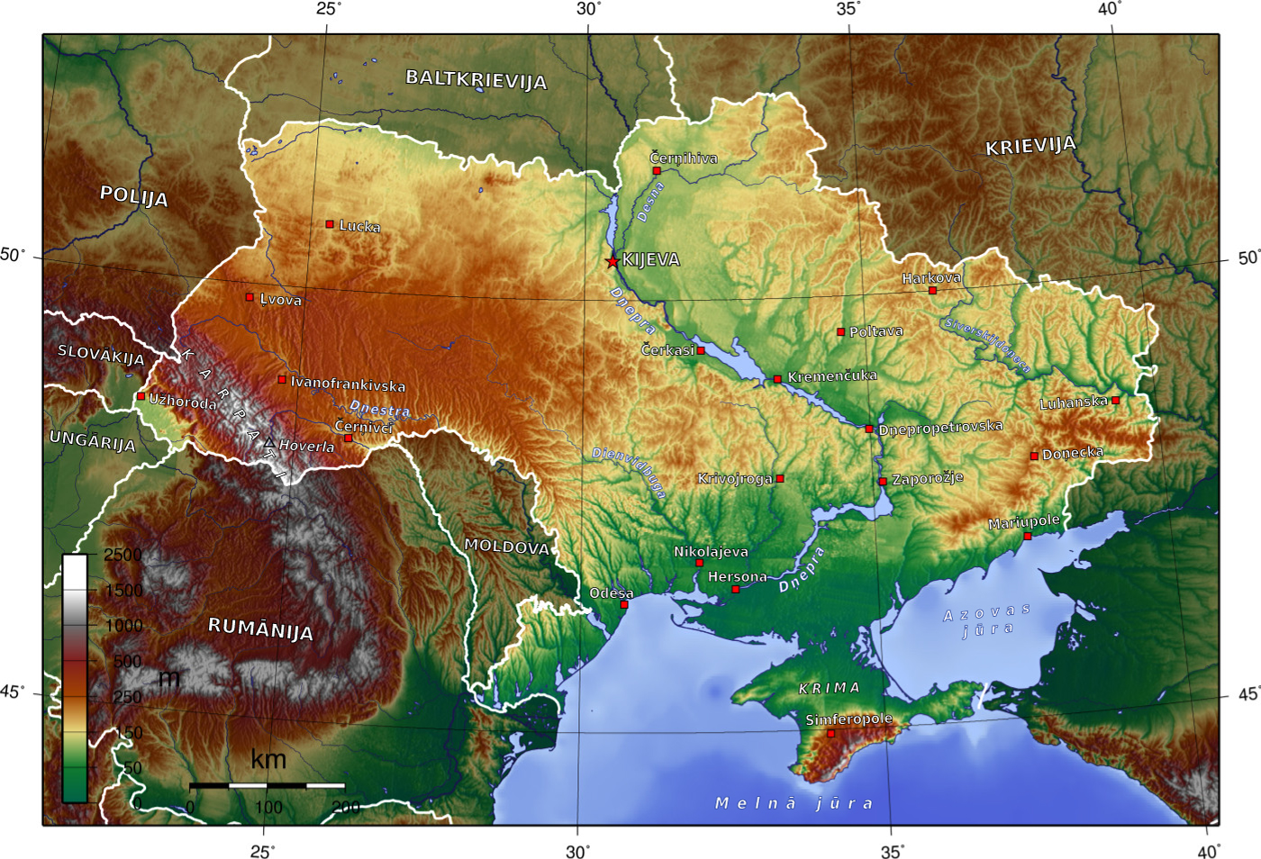 Ukrainas fizģeogrāfiskā karte